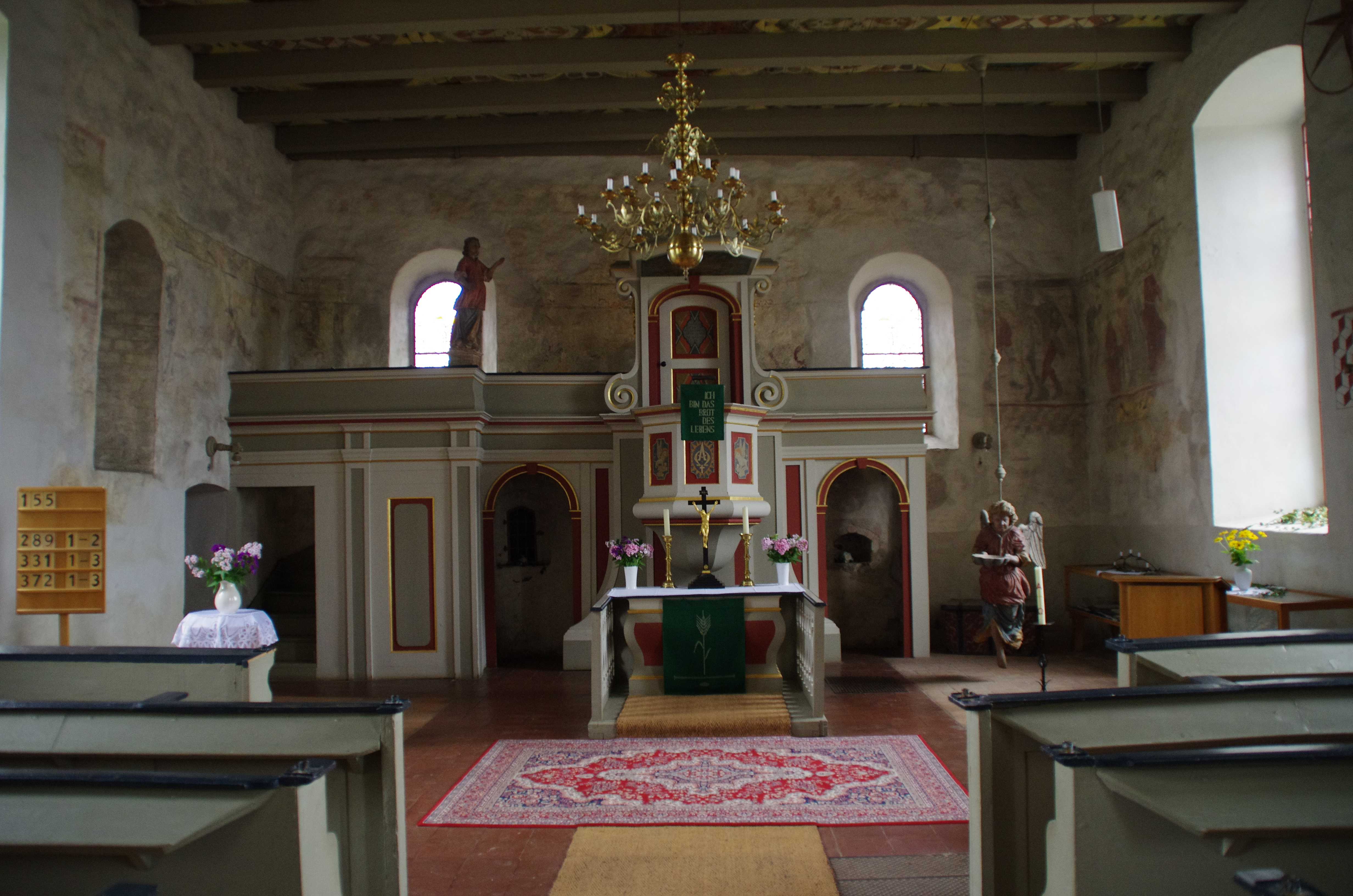 Herzberg (Mark) in Brandenburg. Die Kirche steht unter Denkmalschutz.